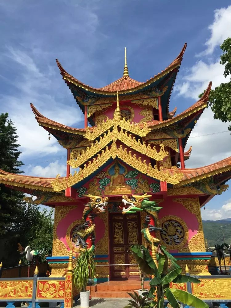 中文（中国大陆）: 沧源县勐角乡金龙寺